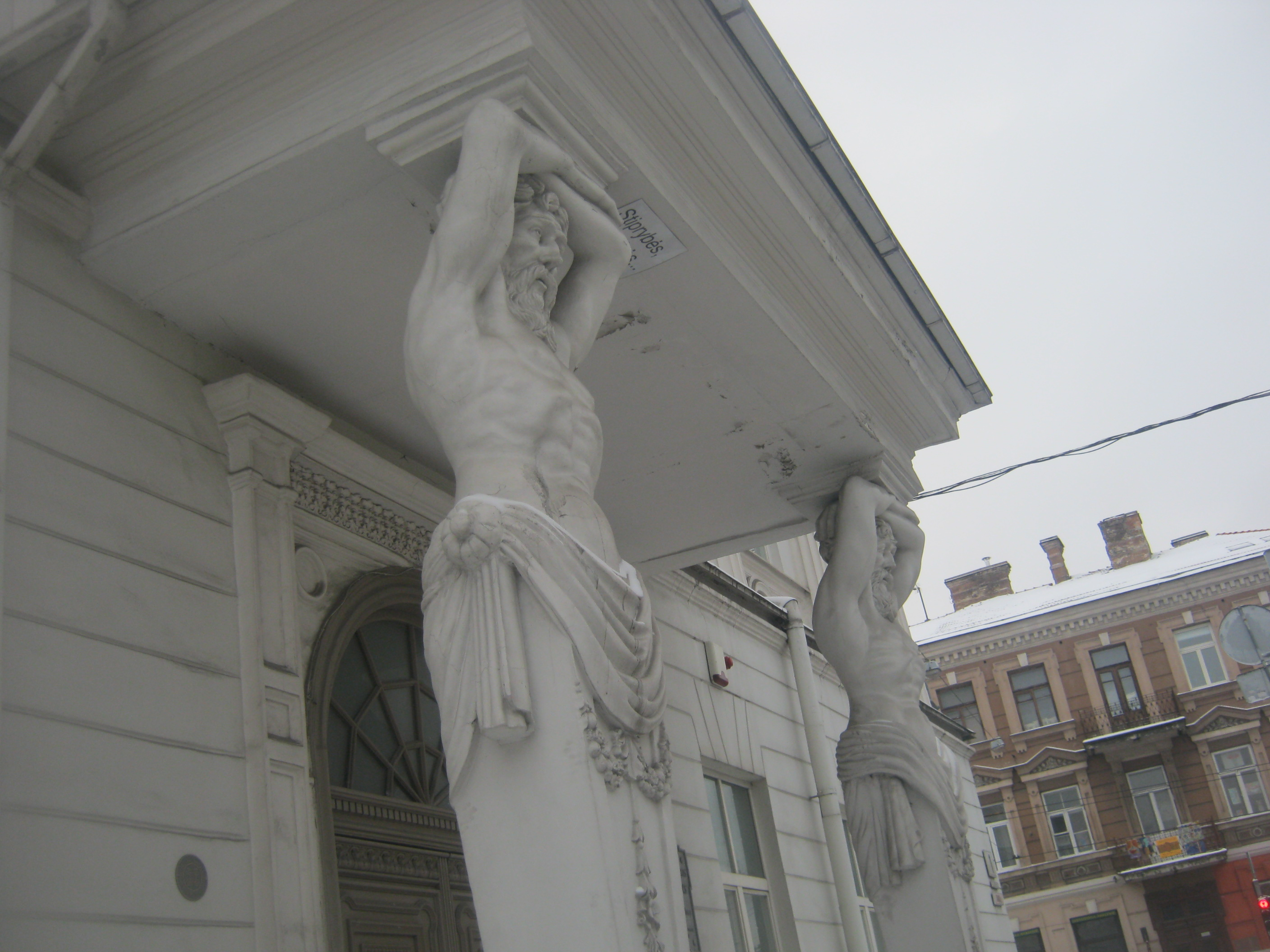 Vilniaus Gedimino Technikos Universitetas